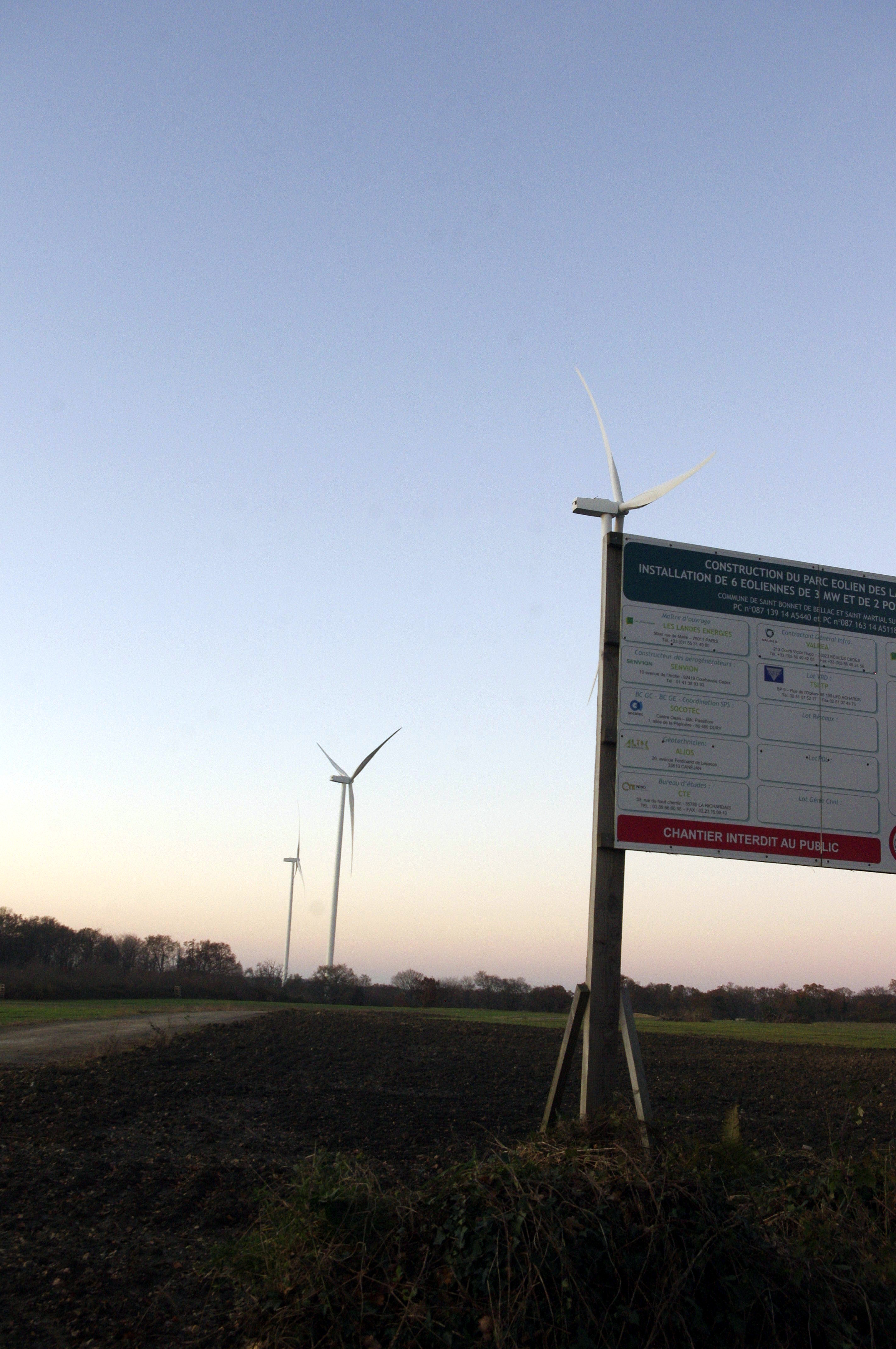 Parc éolien Les Landes sur les communes Saint-Bonnet-de-Bellac et Saint-Martial-sur-Isop, Haute-Vienne, Eoliennes de 200 m de haut, modèle Senvion 3.0M122. Panneau d'information et les éoliennes 1, 2 et 3. Derrière le photographe est l'éolienne 4 (commune de St Martial sur Isop) au bord de la route.